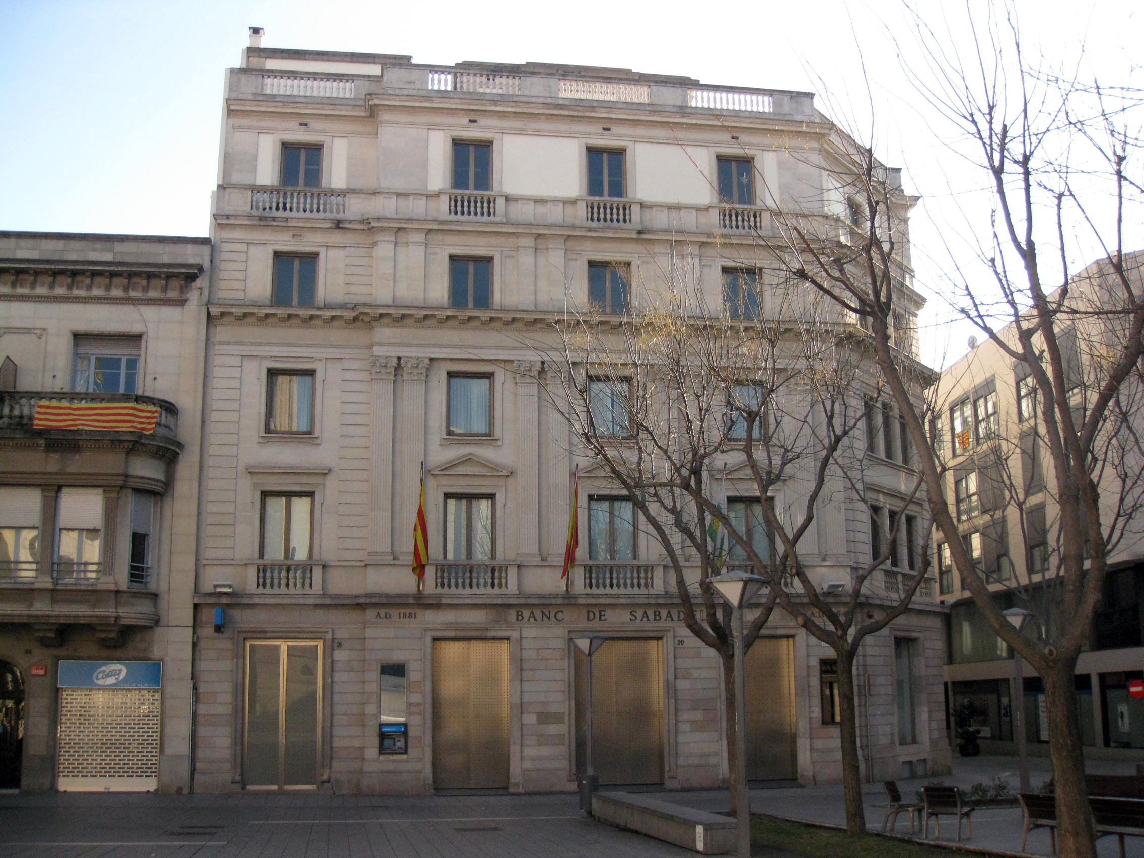 Banc de Sabadell (Sabadell) Object location41° 32′ 45.14″ N, 2° 06′ 30.15″ E